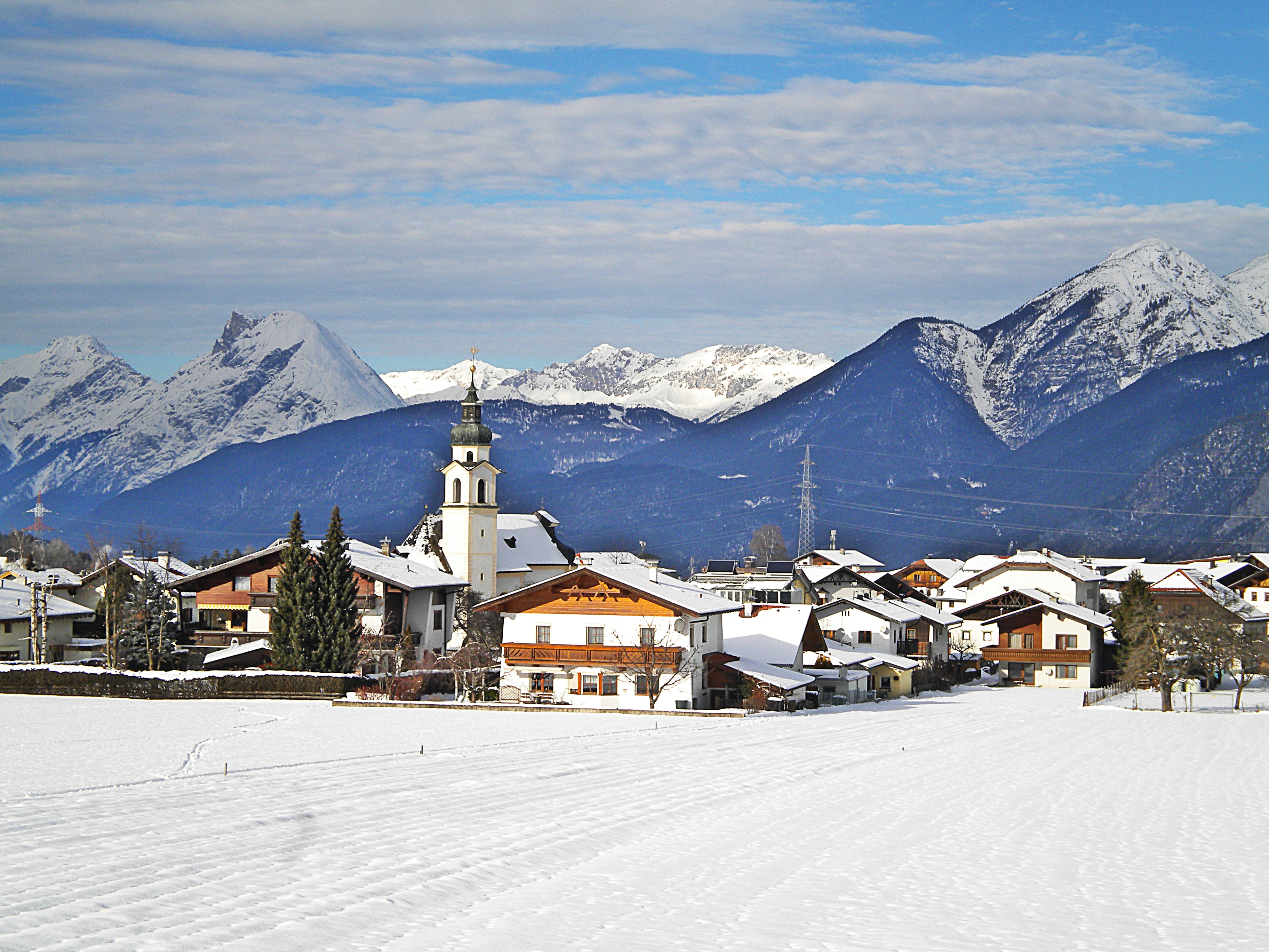 Götzens